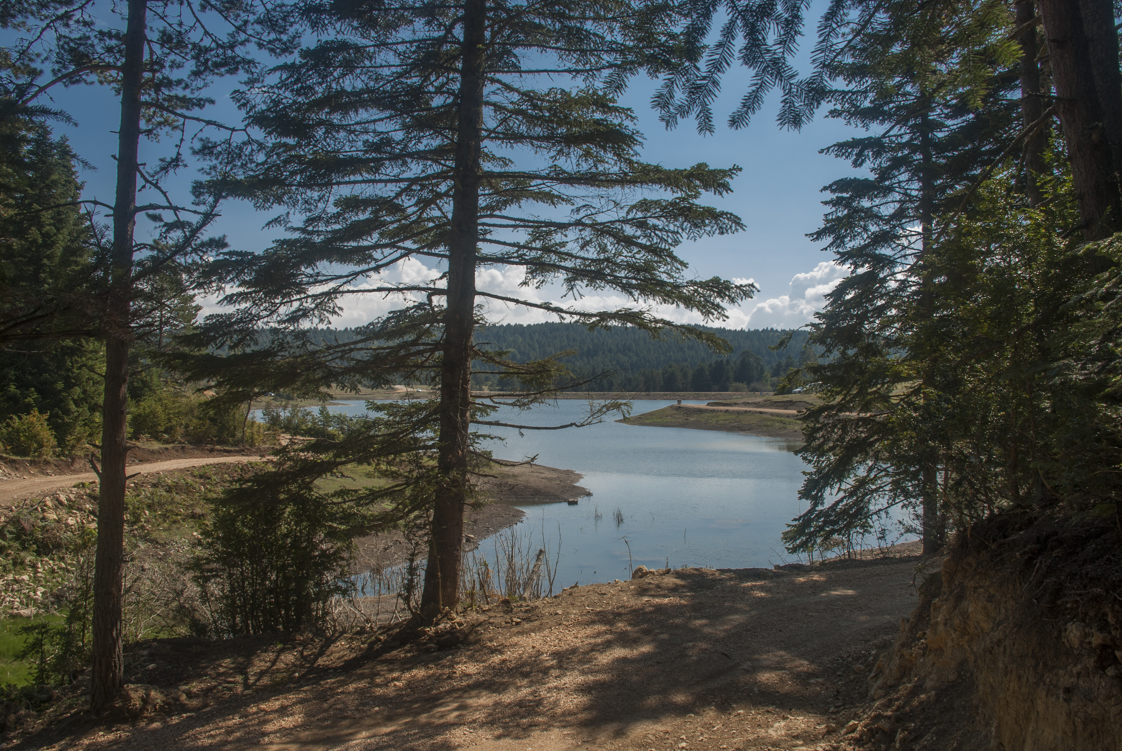 Sakarya, Taraklı, Karagöl Yaylası göleti.